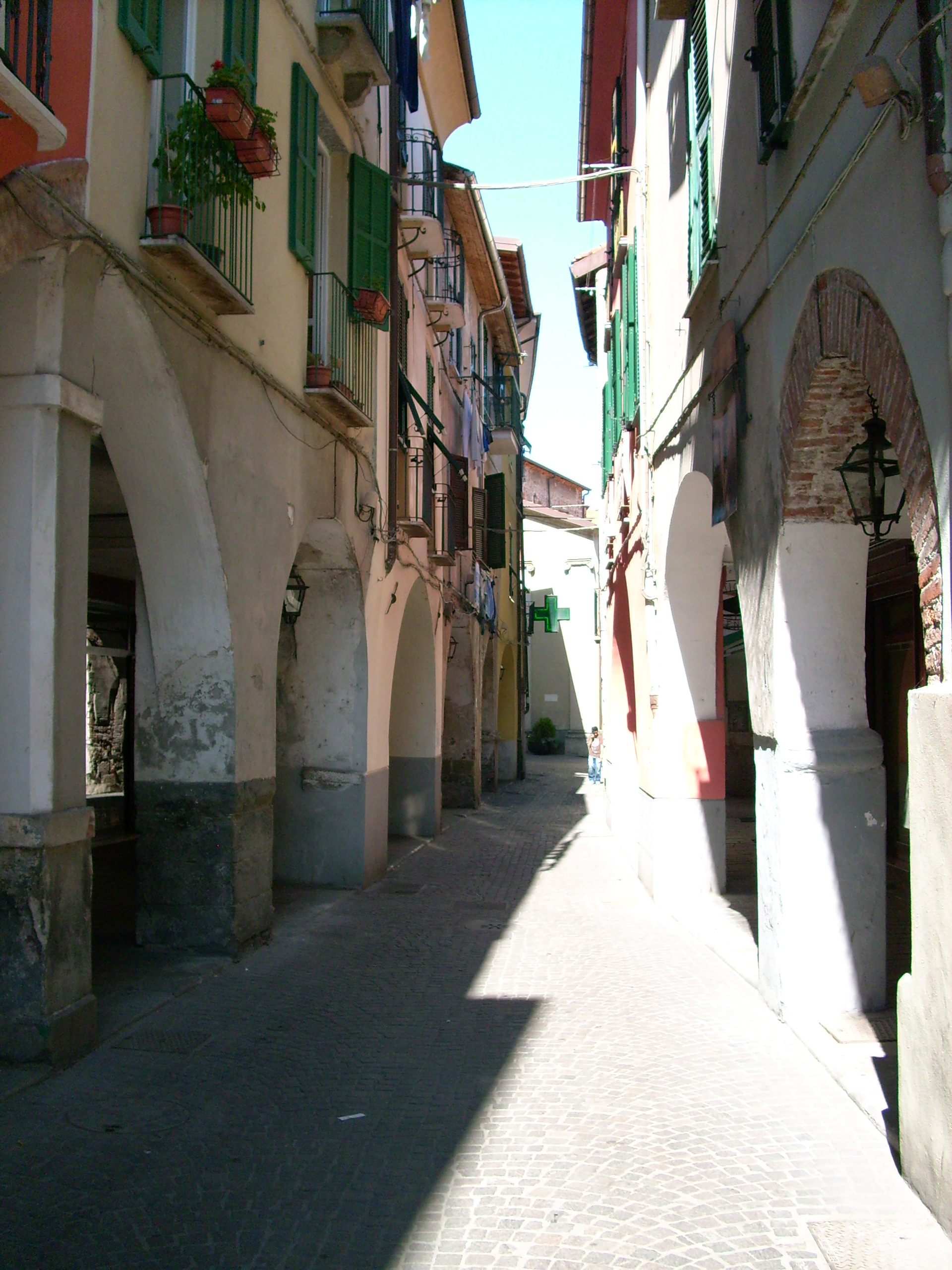 Cairo Montenotte, Liguria, Italia